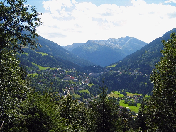 Bad Gastein